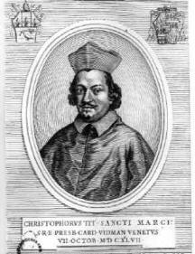 Ritratto del cardinale Cristoforo Widmann.